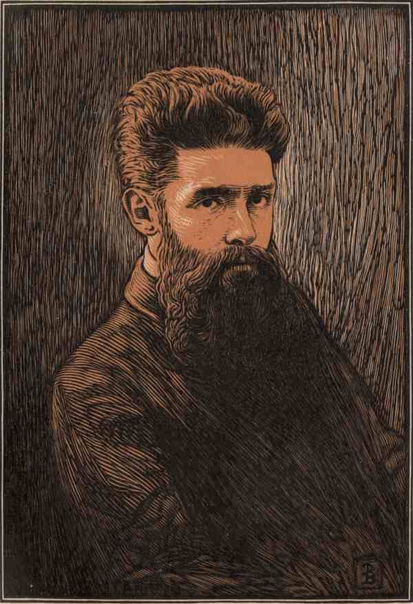 Portrait de Charles Guérin